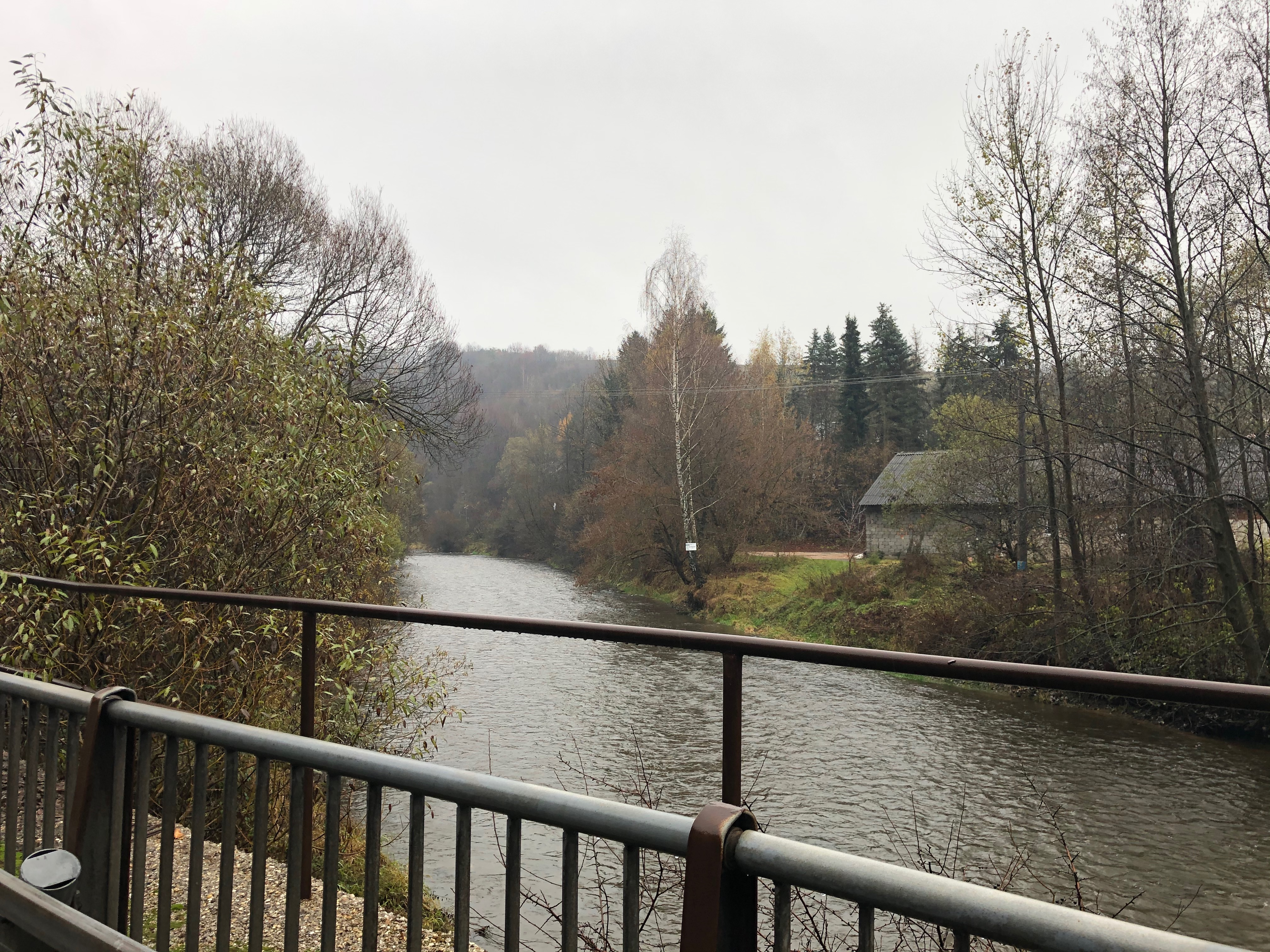 Брезно